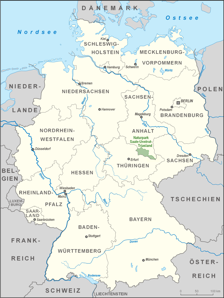 Karte des Naturparks Saale-Unstrut-Triasland in Deutschland